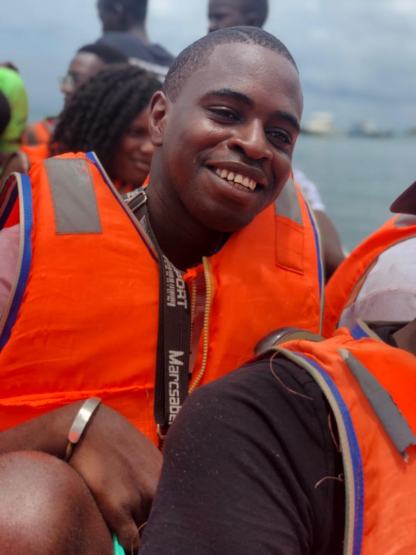 Le premier photo représente un moyen de locomotion traditionnelle qui nous permet de se déplacer en plein mer entre le page de ngor et l’île de ngor. Au départ tous le mode est content car cela reste un véritable expérience qu’on vit rarement This is an image with the theme "Africa on the Move or Transport" from: Senegal